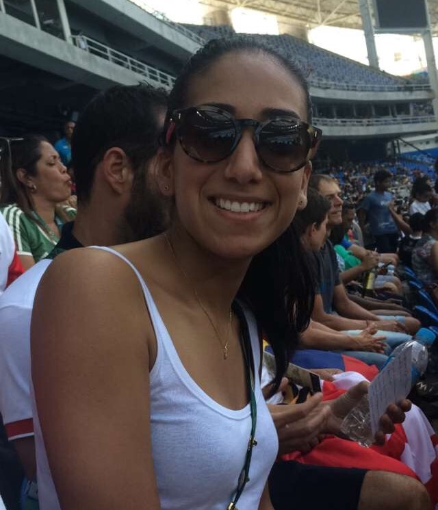 Inès Boubakri (avec son mari, Erwann Le Péchoux, assis juste à coté) au stade olympique de Rio de Janeiro